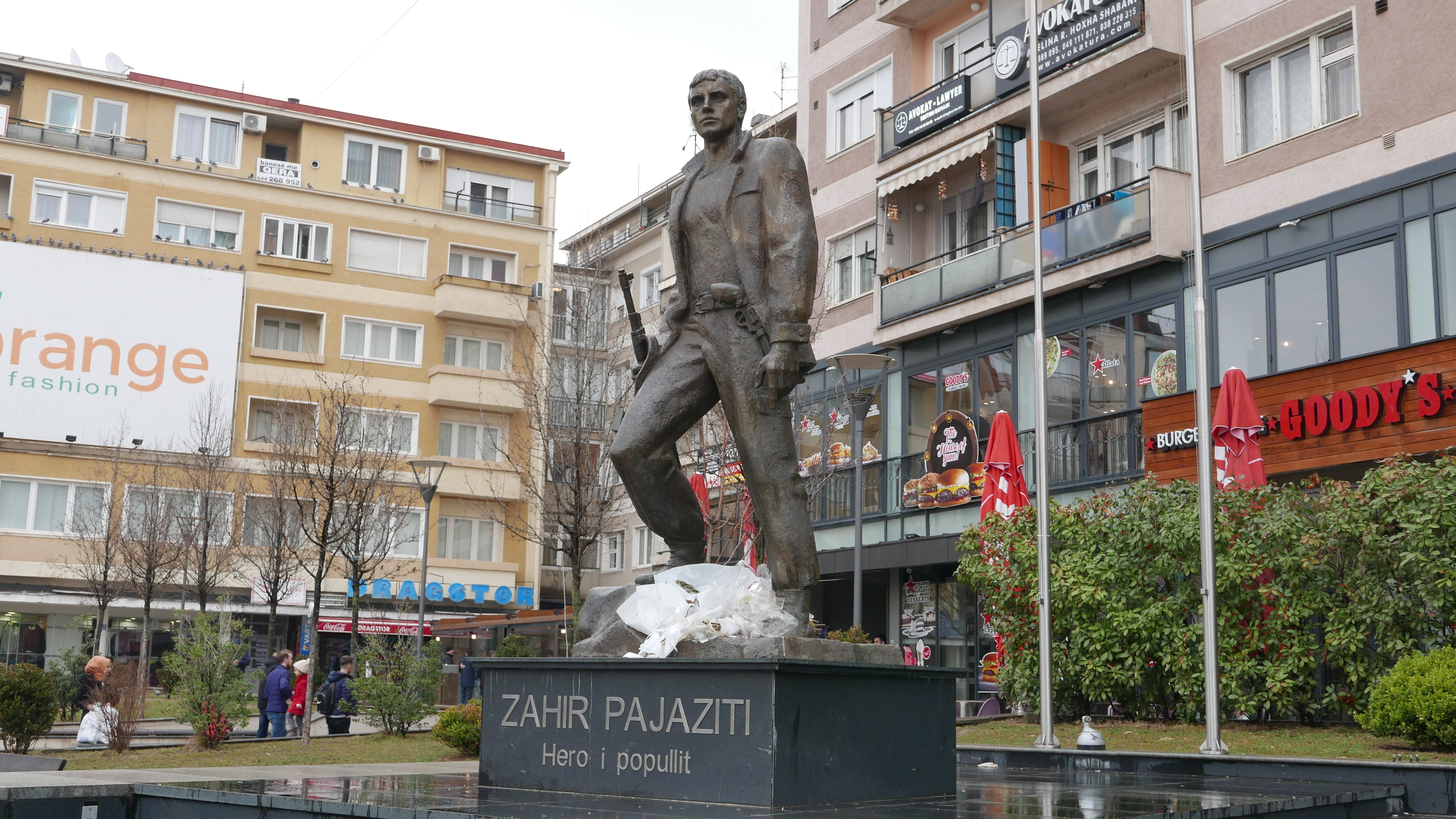 Shtatorja Zahir Pajazitit në Prishtinë, Heroit kombëtar shqiptar